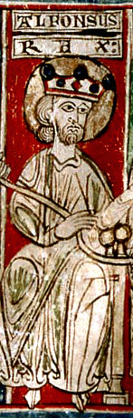 Alfons VIII. Kastilský Tumbo menor de Castilla.